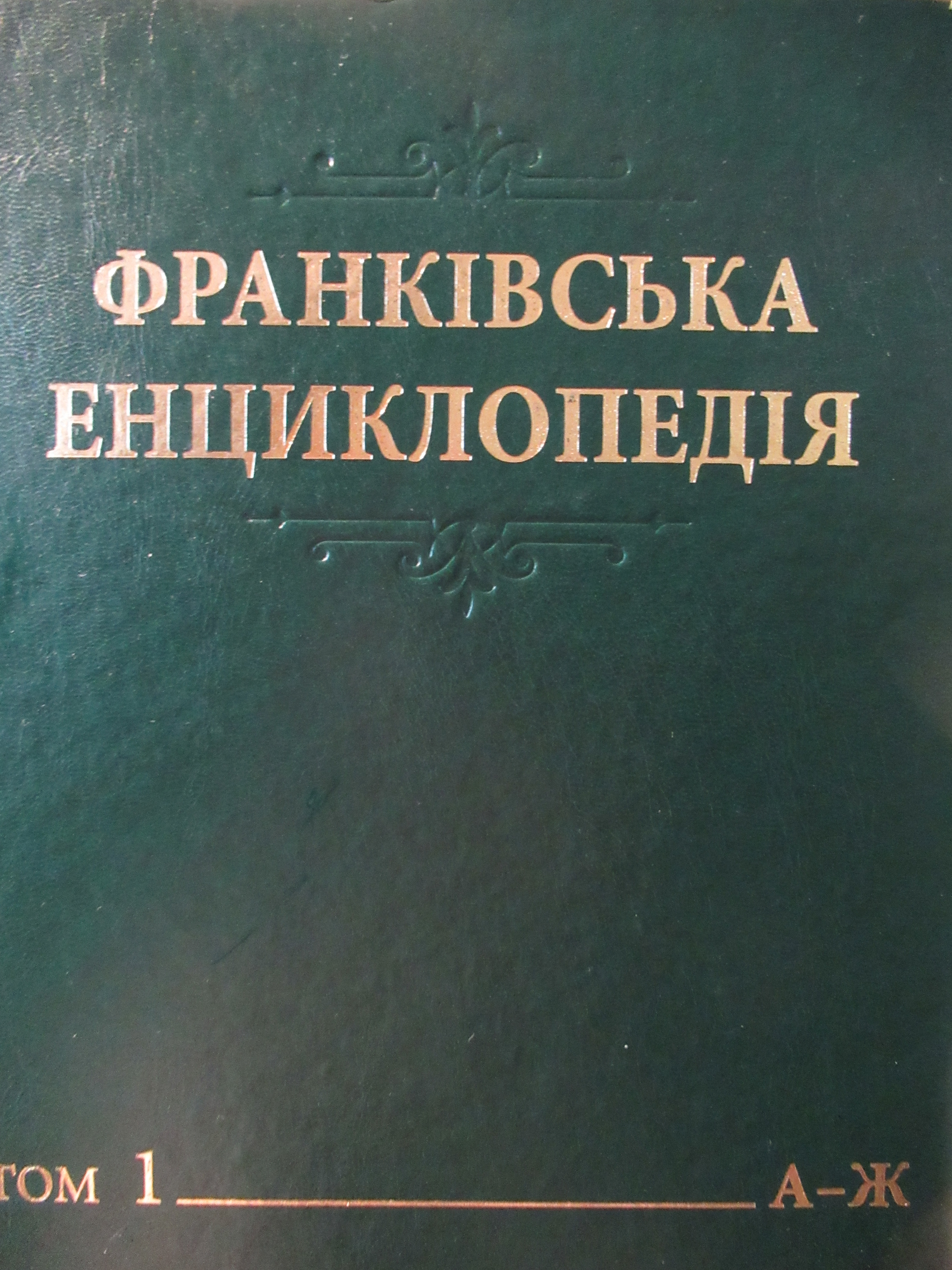 Iwan-Franko-Enzyklopädie (Template:UkS/'Frankivs’ka encyklopedija)